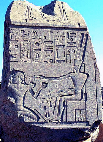 Tempio di Karnak: Amon benedice il faraone